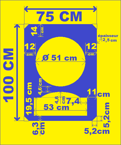 Bouclier De Brennus